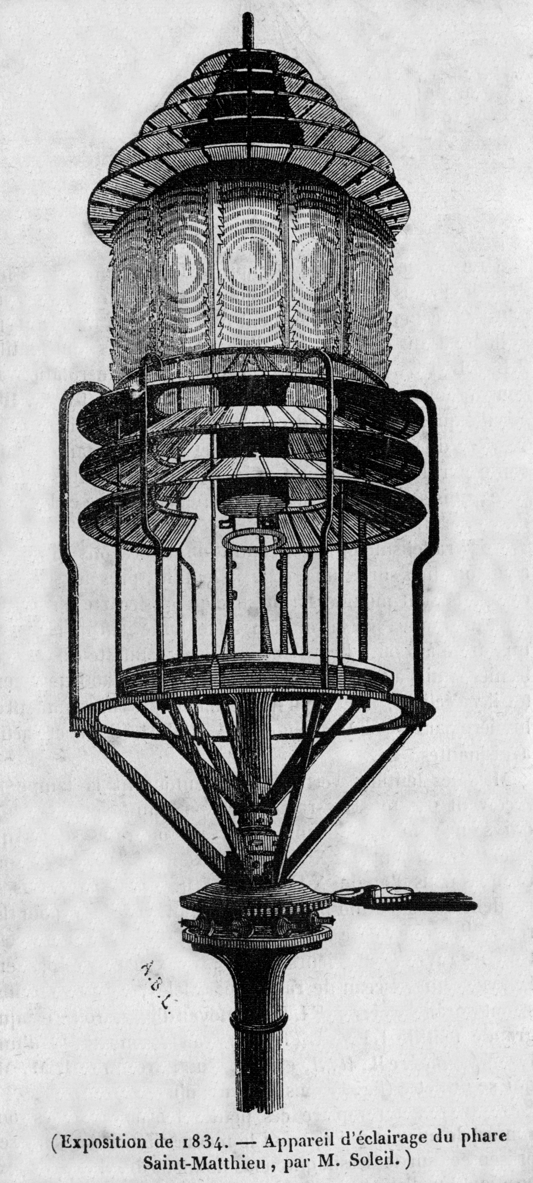 Optique du phare Saint-Mathieu (exposition de 1834)